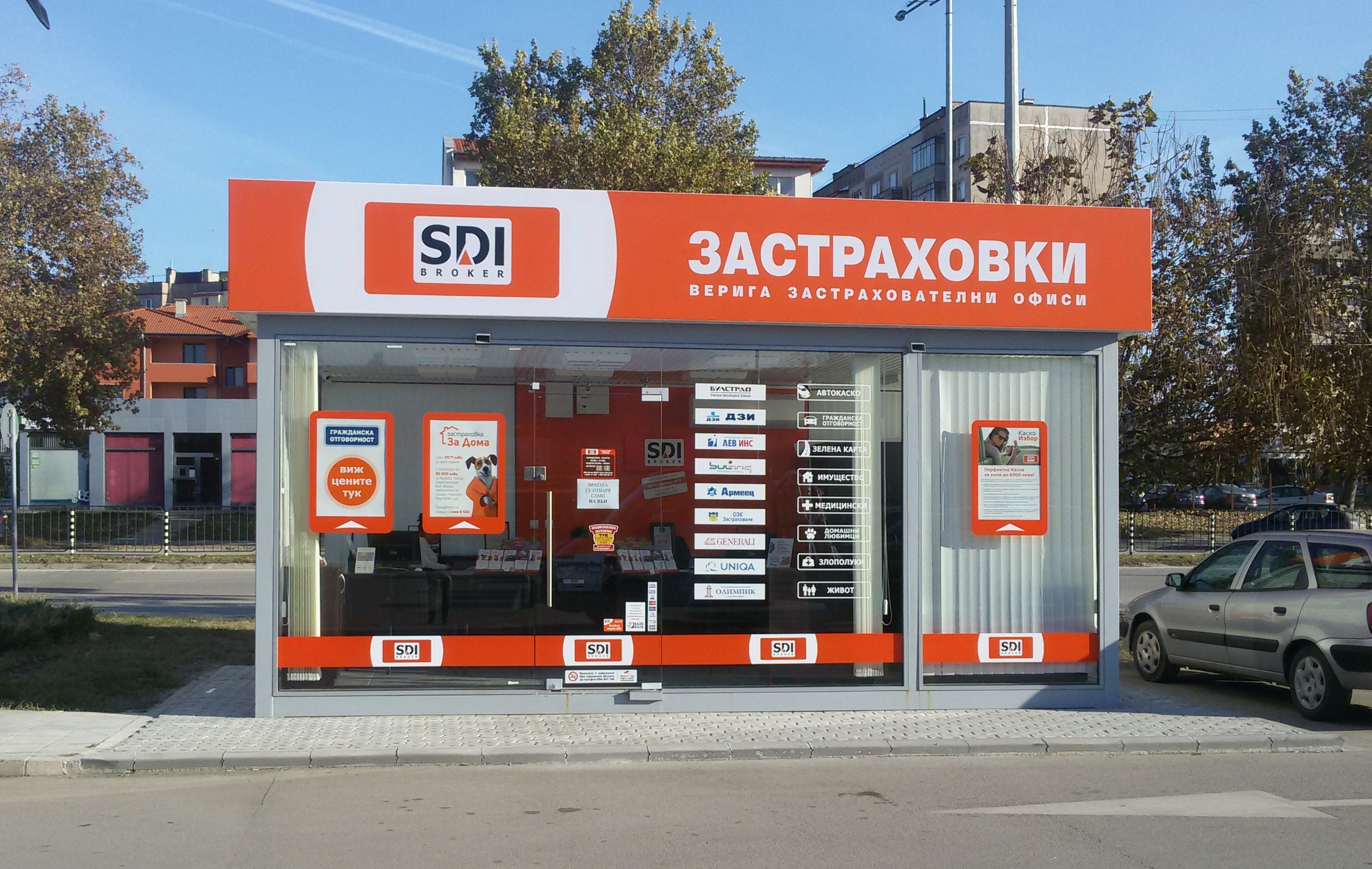 Външен офис на SDI брокер